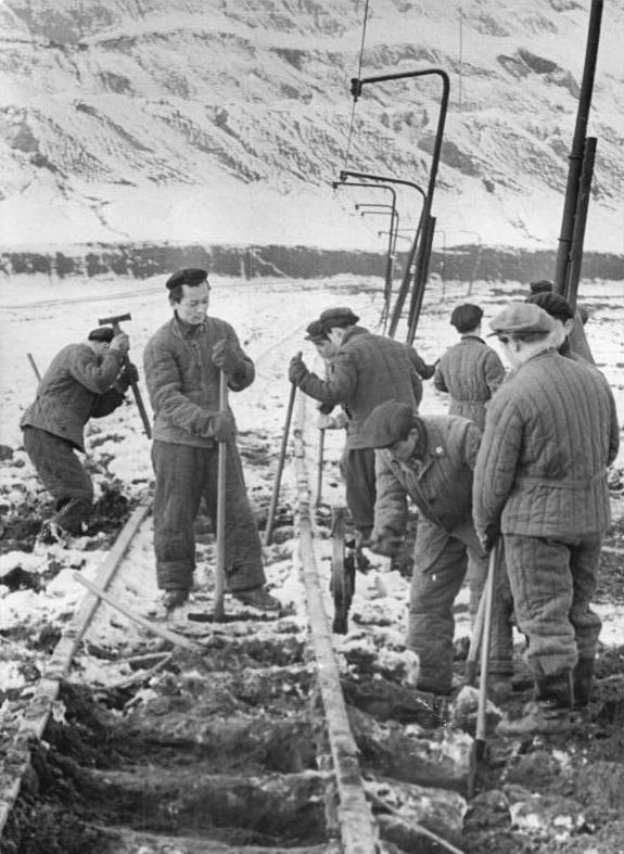 Deutzen, Arbeitseinsatz von koreanischen Studenten Zentralbild Wlocka 4.1.1958 1500 Studenten und Jugendliche helfen den Kumpeln im Revier Borna. In den Tagebauen des Reviers Borna helfen im Dezember 1957 und Januar 1958 1500 Studenten und Oberschüler in freiwilligen Arbeitseinsätzen den Kumpeln. Im Tagebau Deutzen, im Revier Borna, sind 18 koreanische Studenten vom Institut für Ausländerstudium Leipzig eingesetzt. UBz: Die koreanischen Studenten bei Gleisunterhaltungsarbeiten.